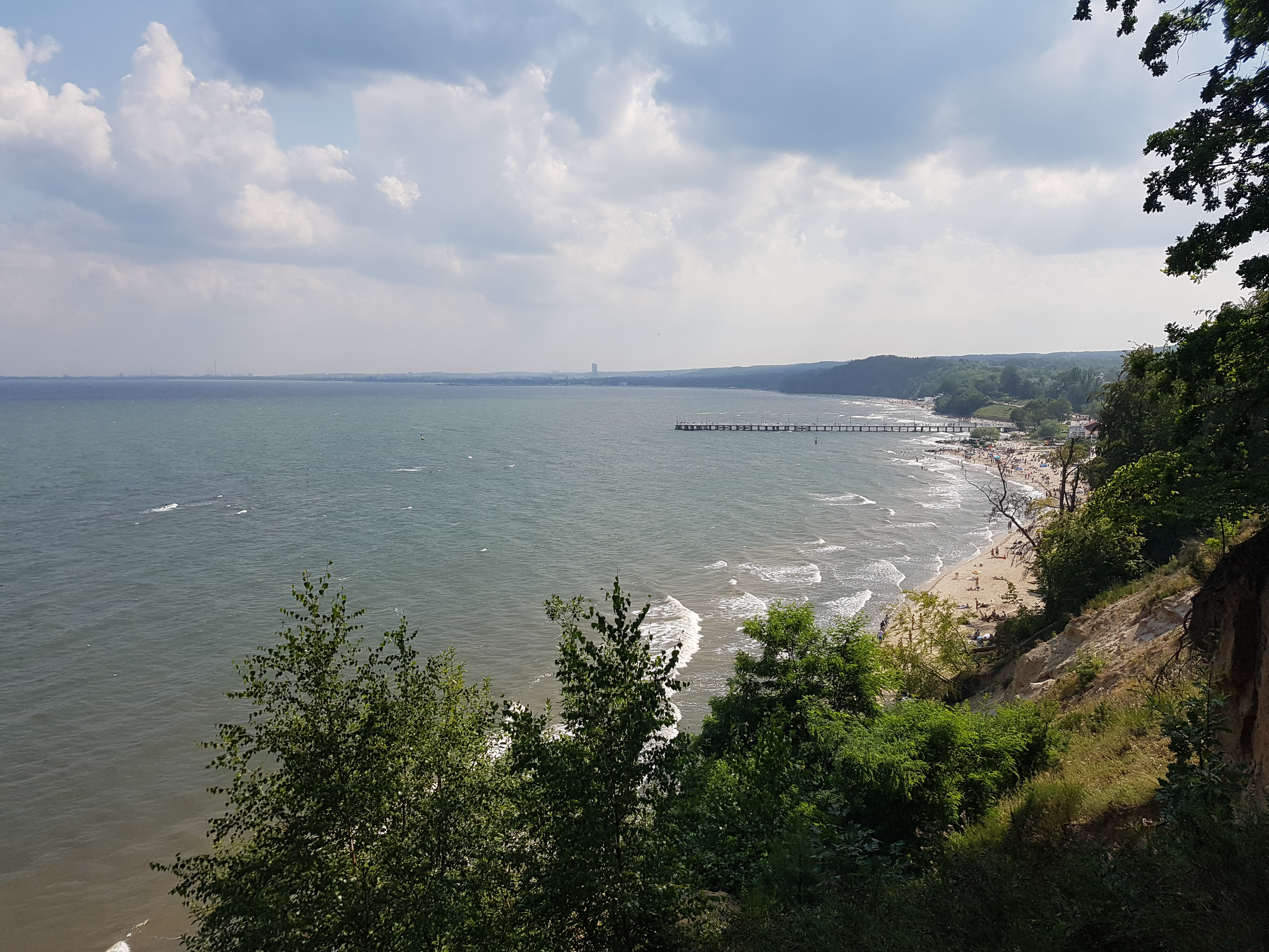 Gdynia - Klif Orłowski